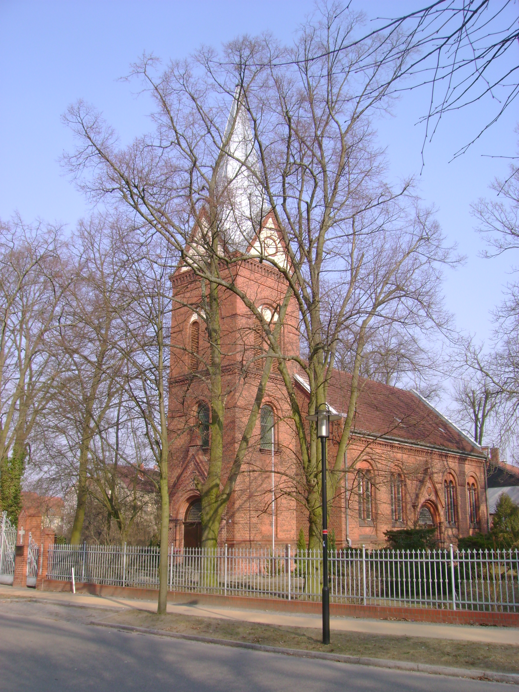 Katholische Kirche St. Josef in Velten, Schulstraße 7. Erbaut 1885